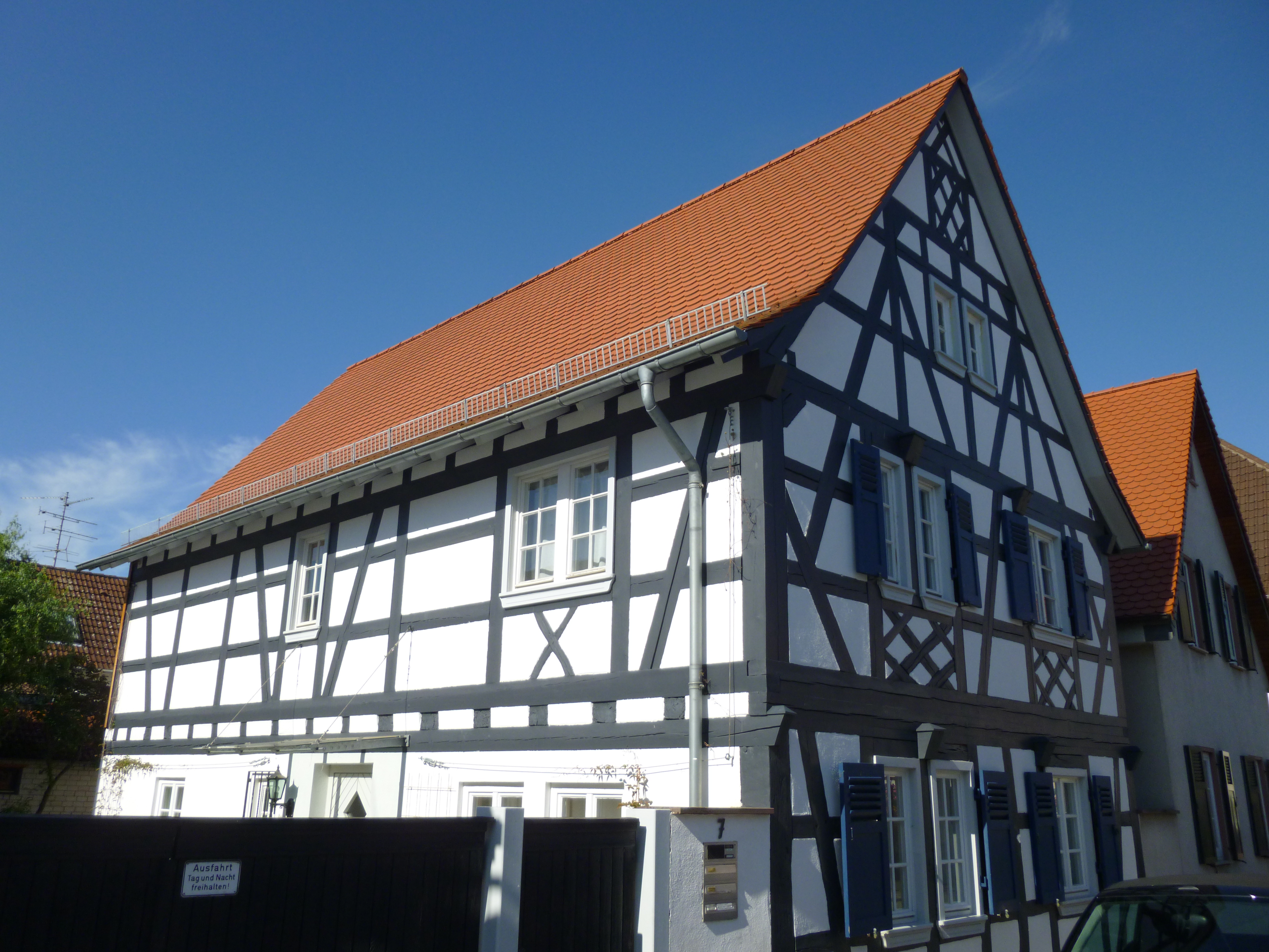 historia trabfaka domo Darmstädter Straße 7 en Darmstadt-Arheilgen